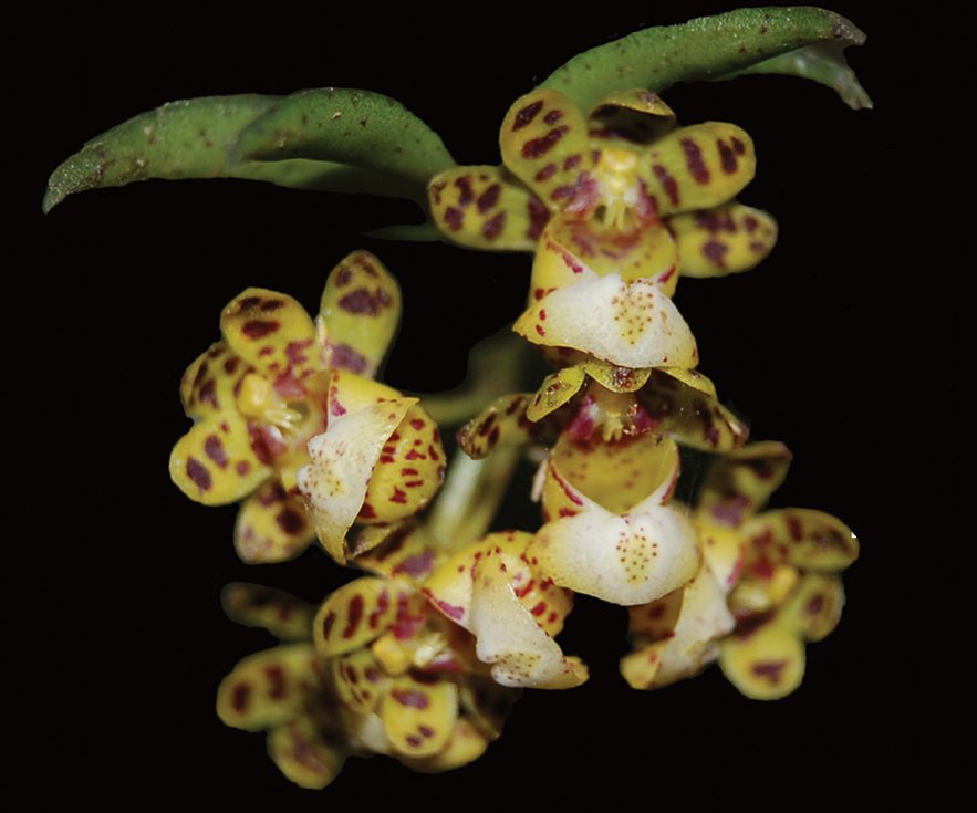 Gastrochilus distichus Blüten